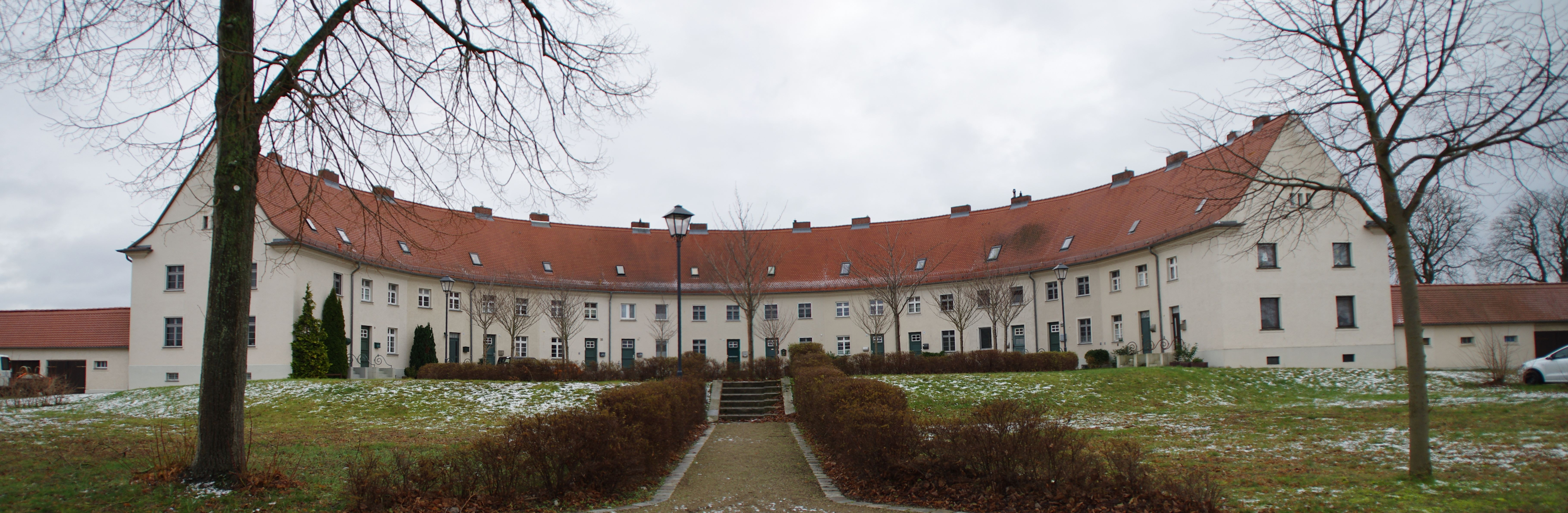 Brandenburg an der Havel Ortsteil Kirchmöser. Das im Namen genannte Gebäude steht unter Denkmalschutz.